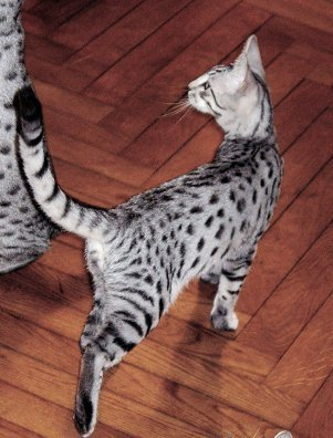 Senefer de Fondcombe, mau égyptien Silver Mis à disposition de Wikipédia par Didier Hallépée et l'Association Internationale du Mau Egyptien